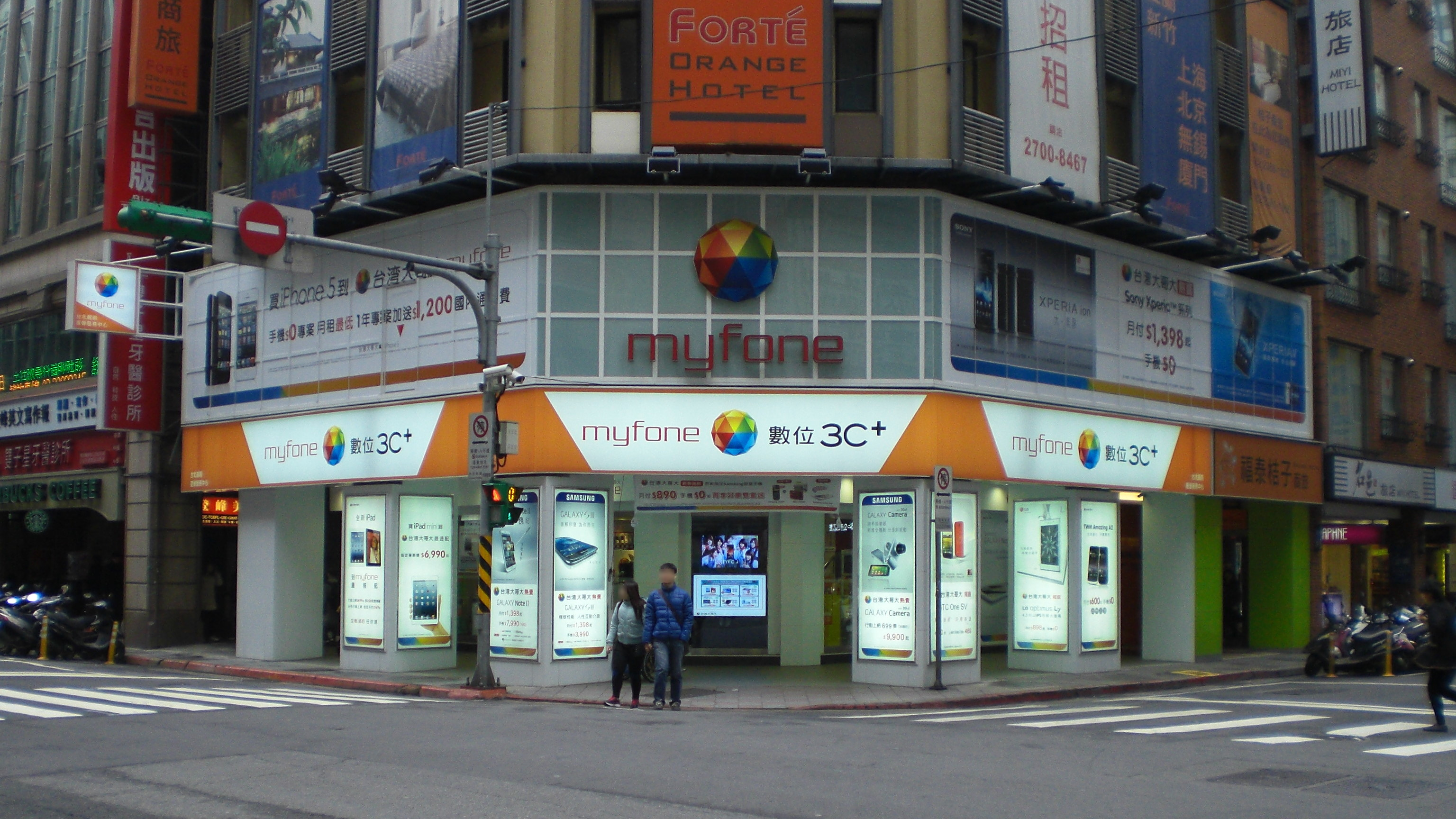 台灣大哥大myfone台北館前直營服務中心，地址：台北市中正區館前路22號1樓。